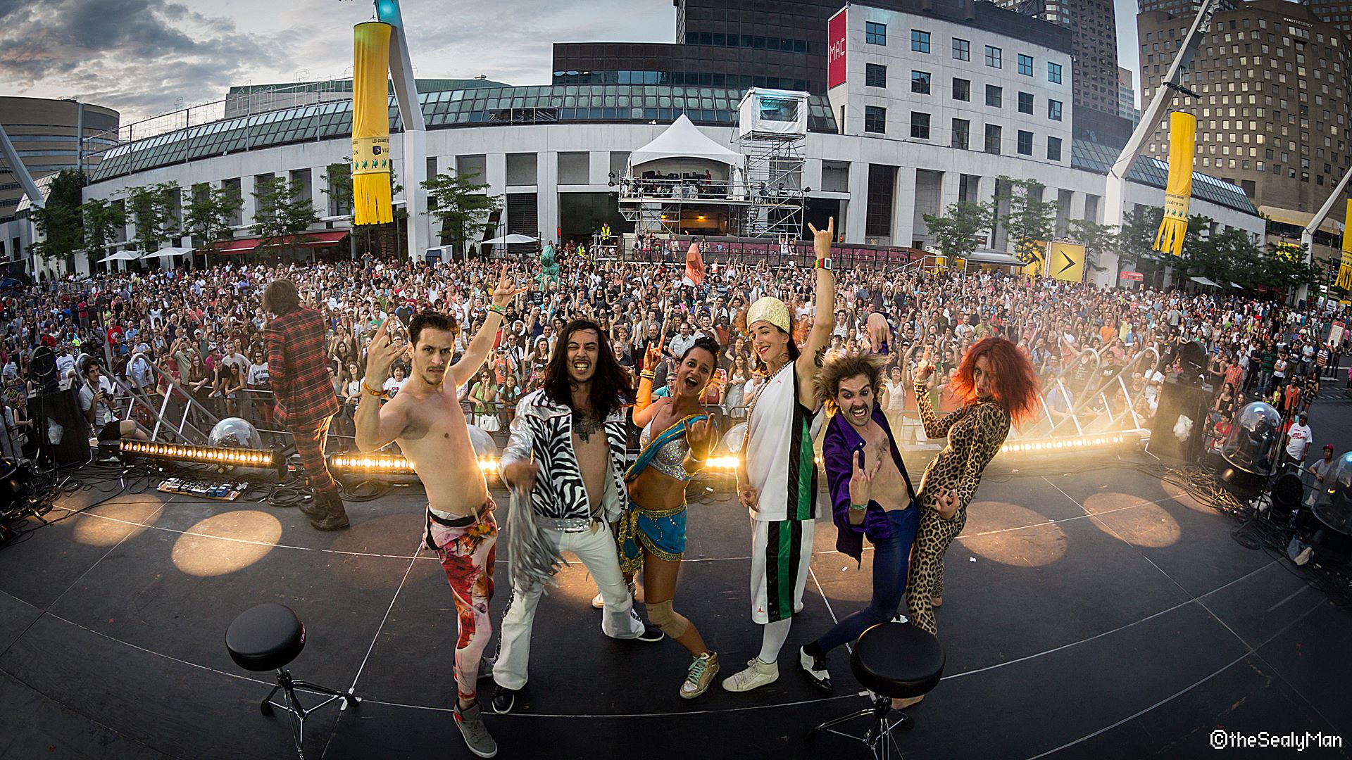 Le groupe pendant le festival juste pour rire de Montréal 2014